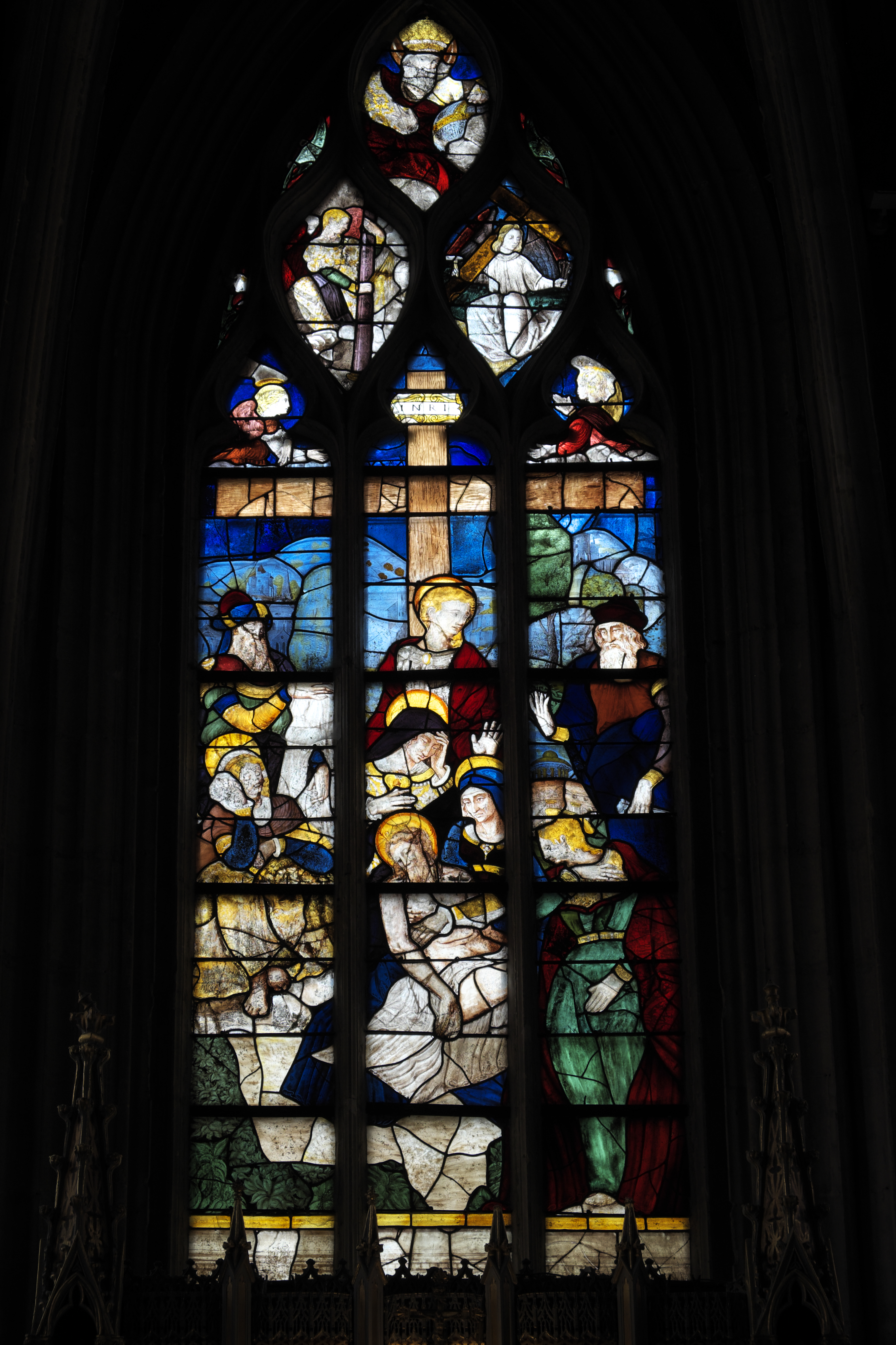 Katholische Pfarrkirche Notre-Dame-des-Marais in La Ferté-Bernard im Département Sarthe (Pays de la Loire/Frankreich), Bleiglasfenster (baie 0) aus der zweiten Hälfte des 16. Jahrhunderts, mit Fragmenten aus dem späten 15. Jahrhundert im Maßwerk; Darstellung: Beweinung Jesu